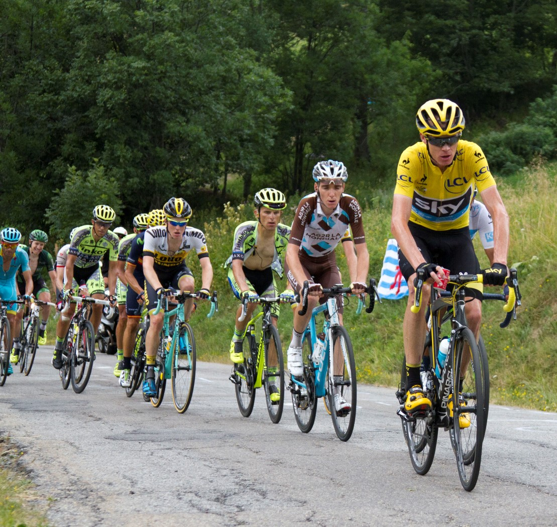 173 groep gele trui